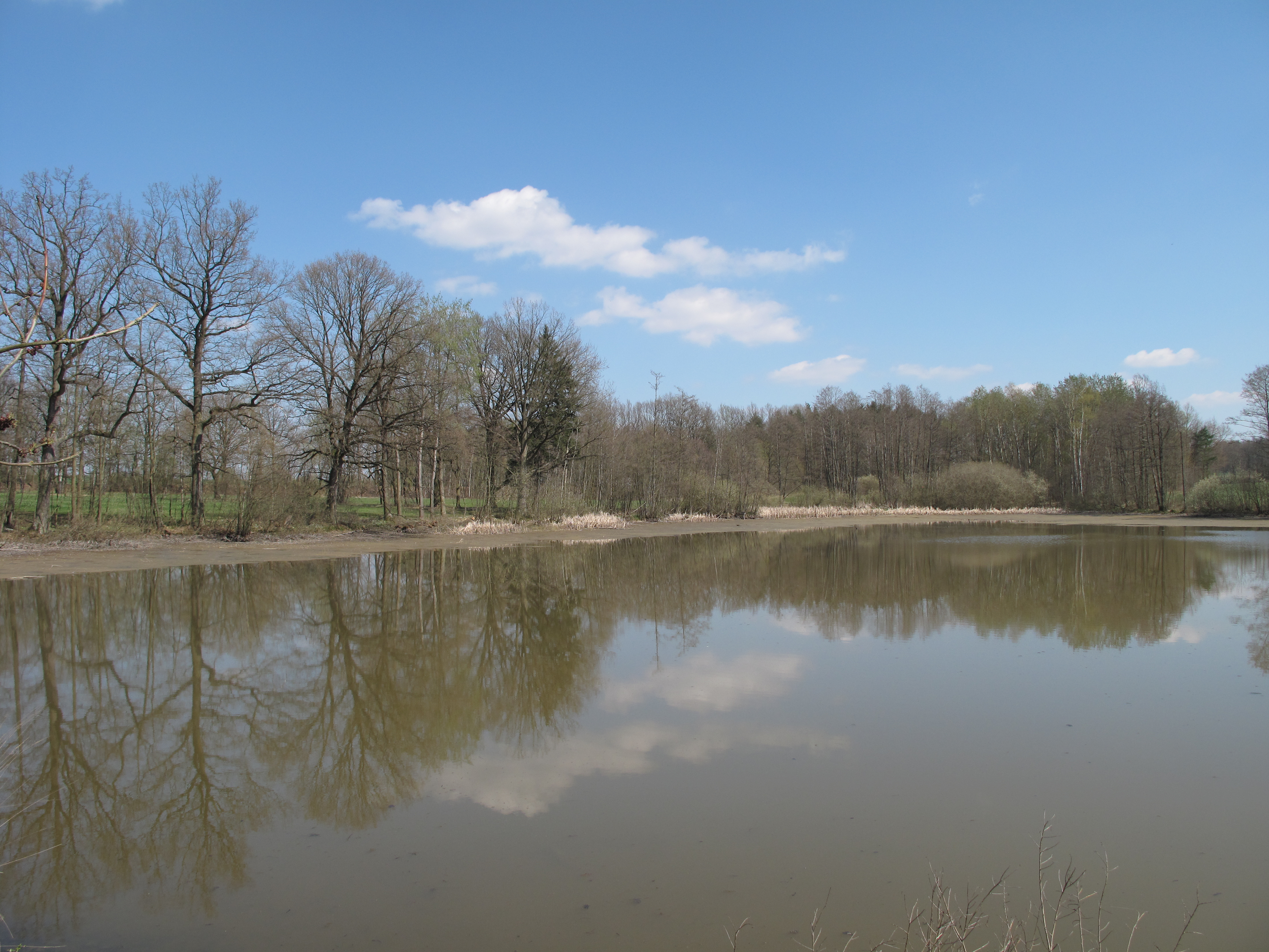 Dvorský rybník v Soběticích. Okres České Budějovice, Česká republika.